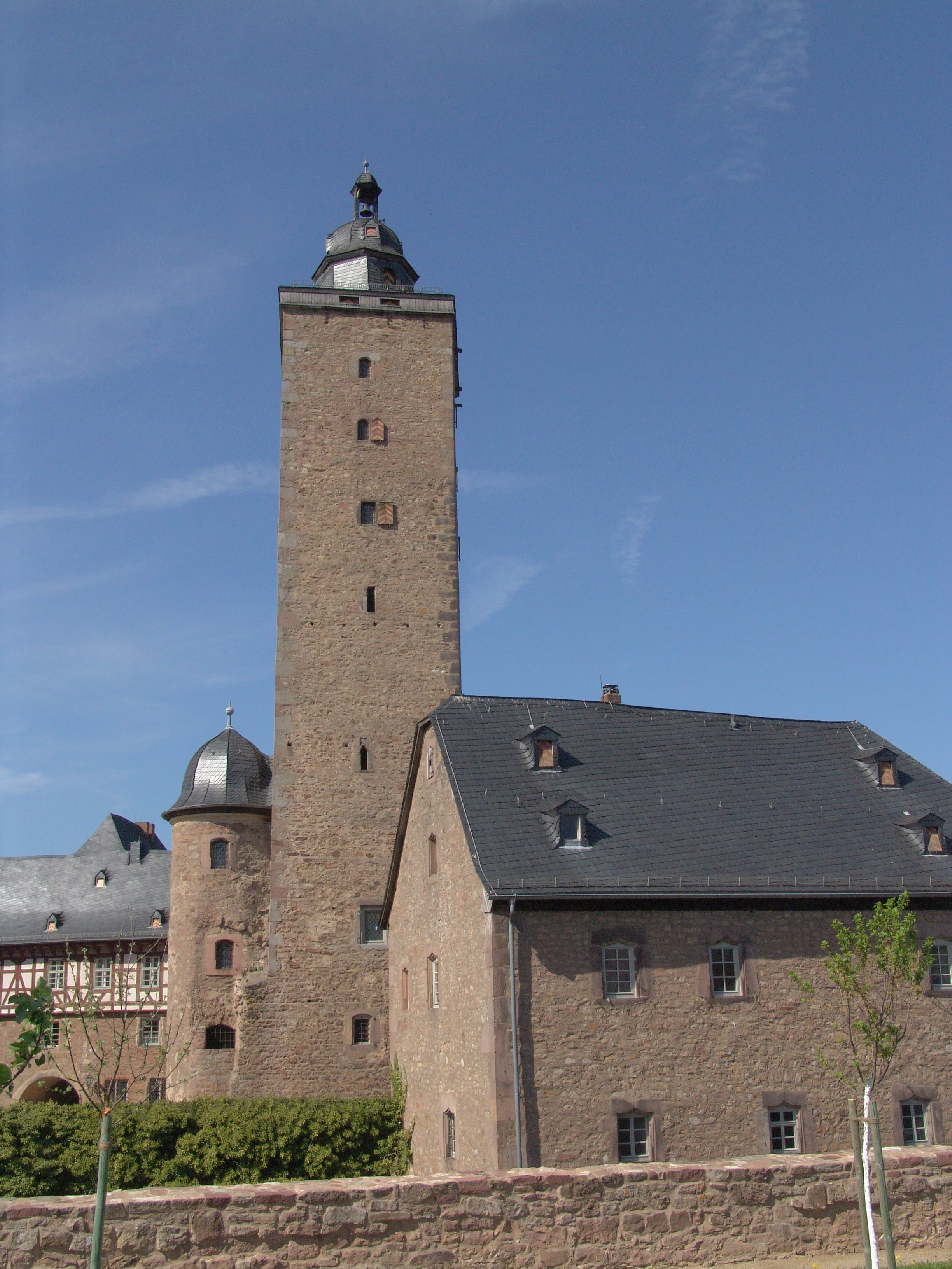 Schloss Steinau